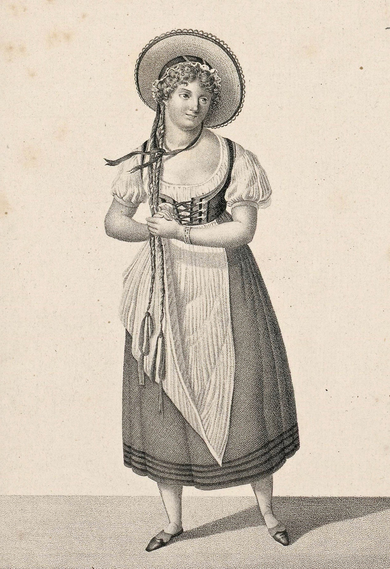 Pierre-Paul Prud'hon (1758–1823) nach Adrien-Jean-Baptiste Mussat genannt Jolly (1772–1839): Jeanne-Charlotte Schroeder genannt Saint-Aubin (1764–1850) als "Lisbeth", 1801. Das gleichnamige Drame lyrique von André-Ernest-Modeste Grétry (1741–1813) und Edmond-Guillaume-François de Favières (1755–1837) wurde 1797 uraufgeführt. Die Handlung, in deren Zentrum der Idyllendichter Salomon Gessner (1730–1788) steht, spielt in der Gegend von Zürich.